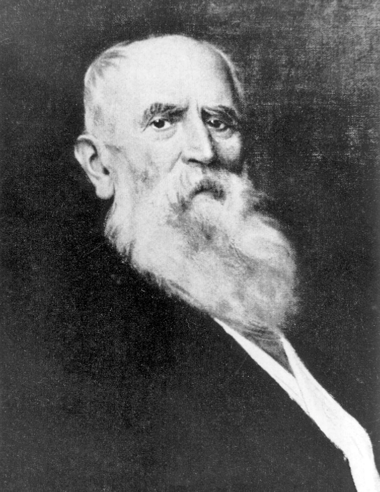 Friedrich Engelhorn (* 17. Juli 1821 in Mannheim; † 11. März 1902 ebenda), founder of BASF